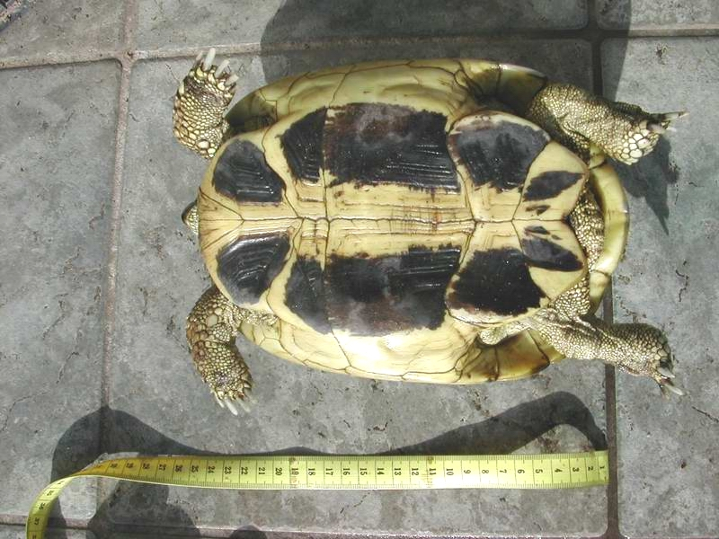 Testudo hermanni hermanni 'Sarda'